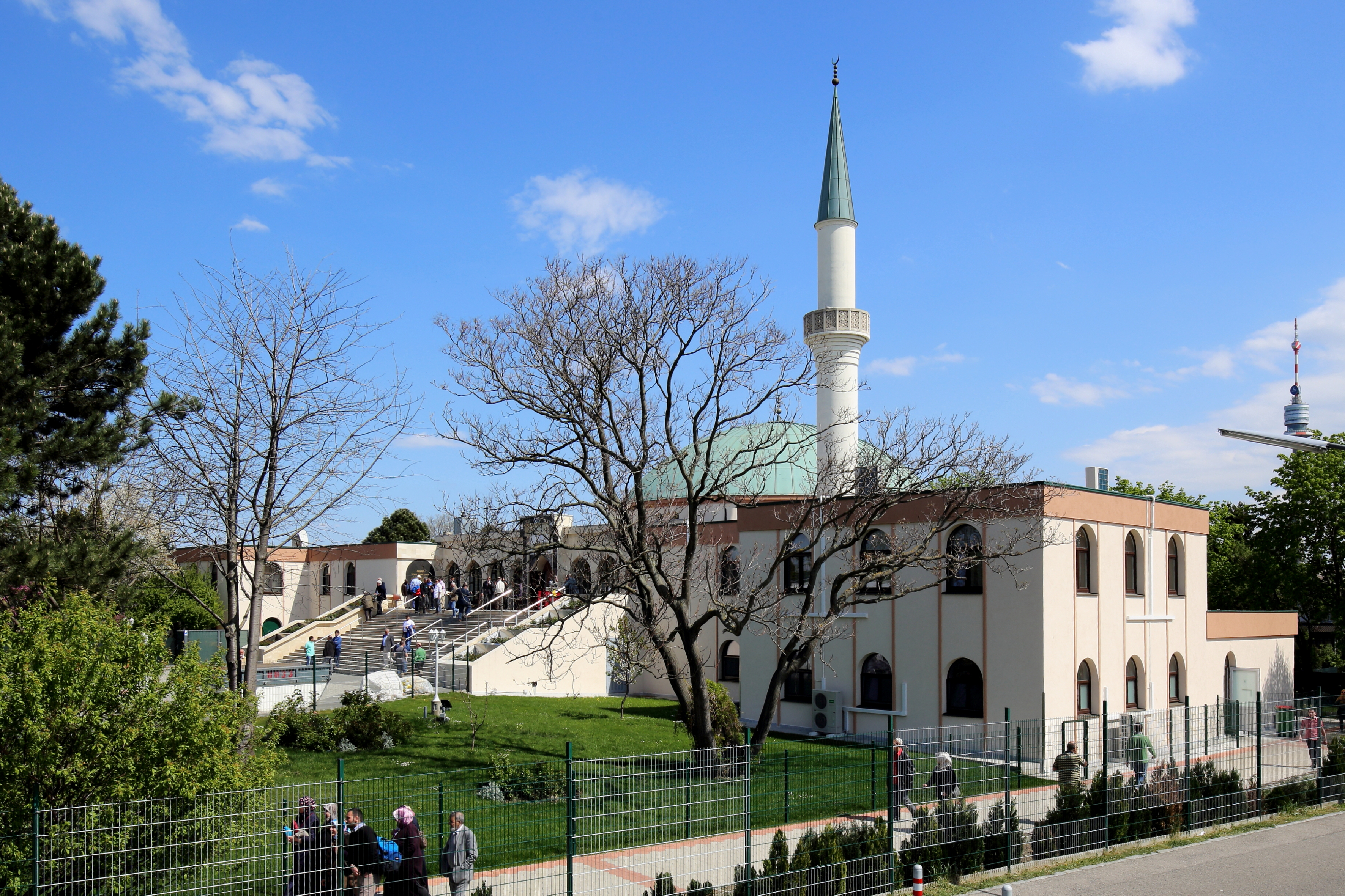 Westansicht des Islamischen Zentrum Wien in Bruckhaufen, ein Ortsteil im 21. Wiener Gemeindebezirk Floridsdorf.Die Moschee mit einem 32 m hohen Minarett und einer Kuppel mit rund 20 m Durchmesser wurde von 1975 bis 1979 von Baumeister Richard Lugner im Auftrag des saudi-arabischen Königs Faisal ibn Abd al-Aziz errichtet.